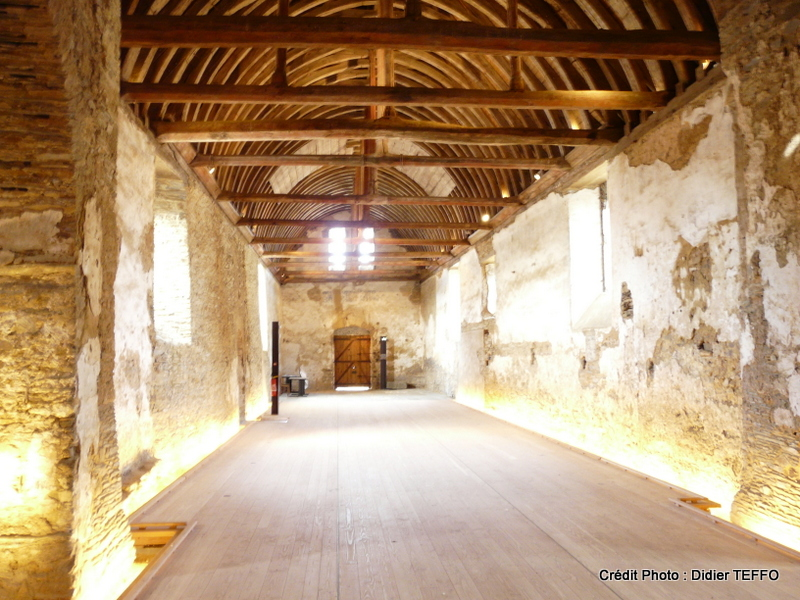 Vue d'ensemble de l'intérieur de l'ancienne église du vieux-bourg de Nozay